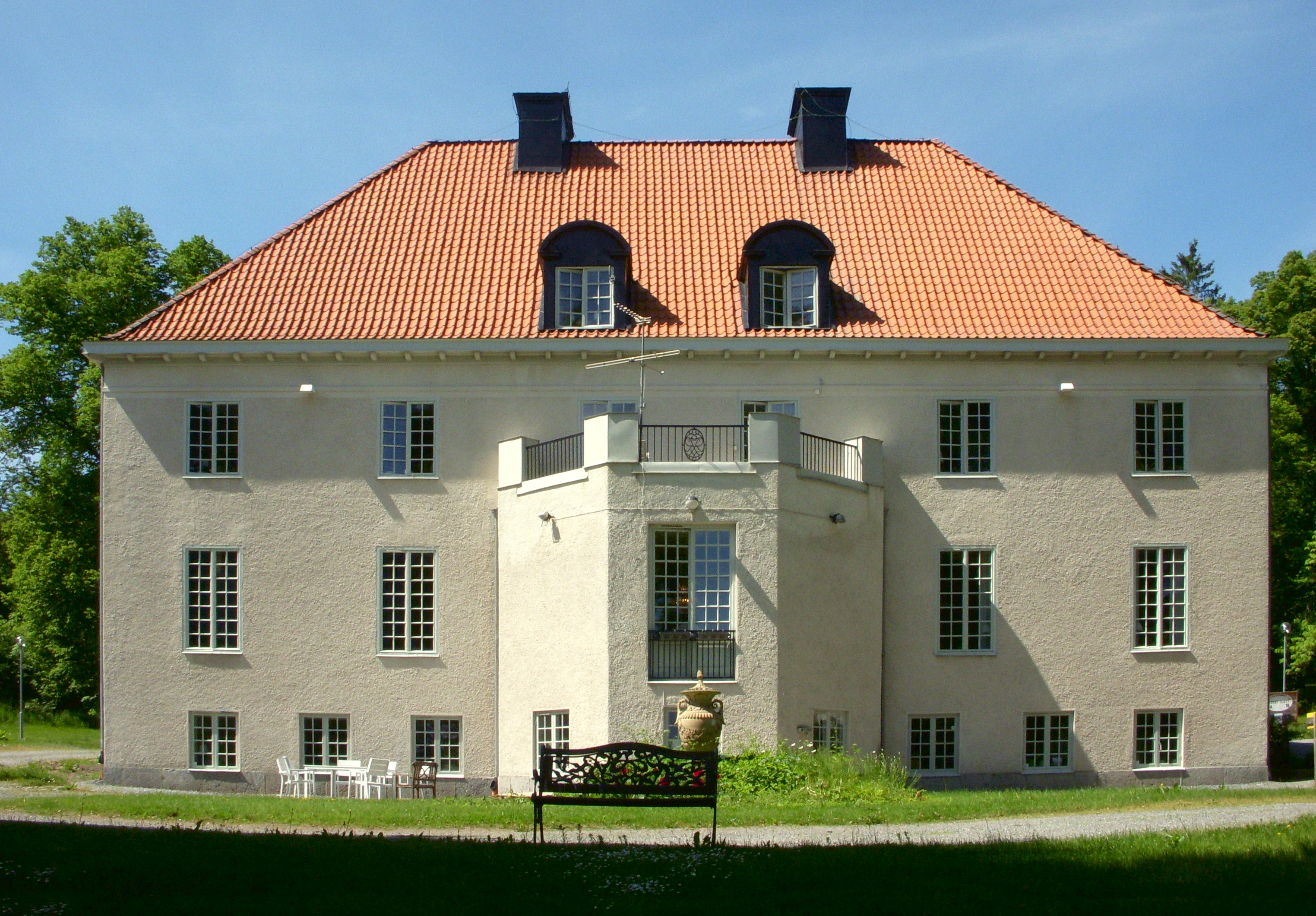 Edsby slott i Upplands Väsby